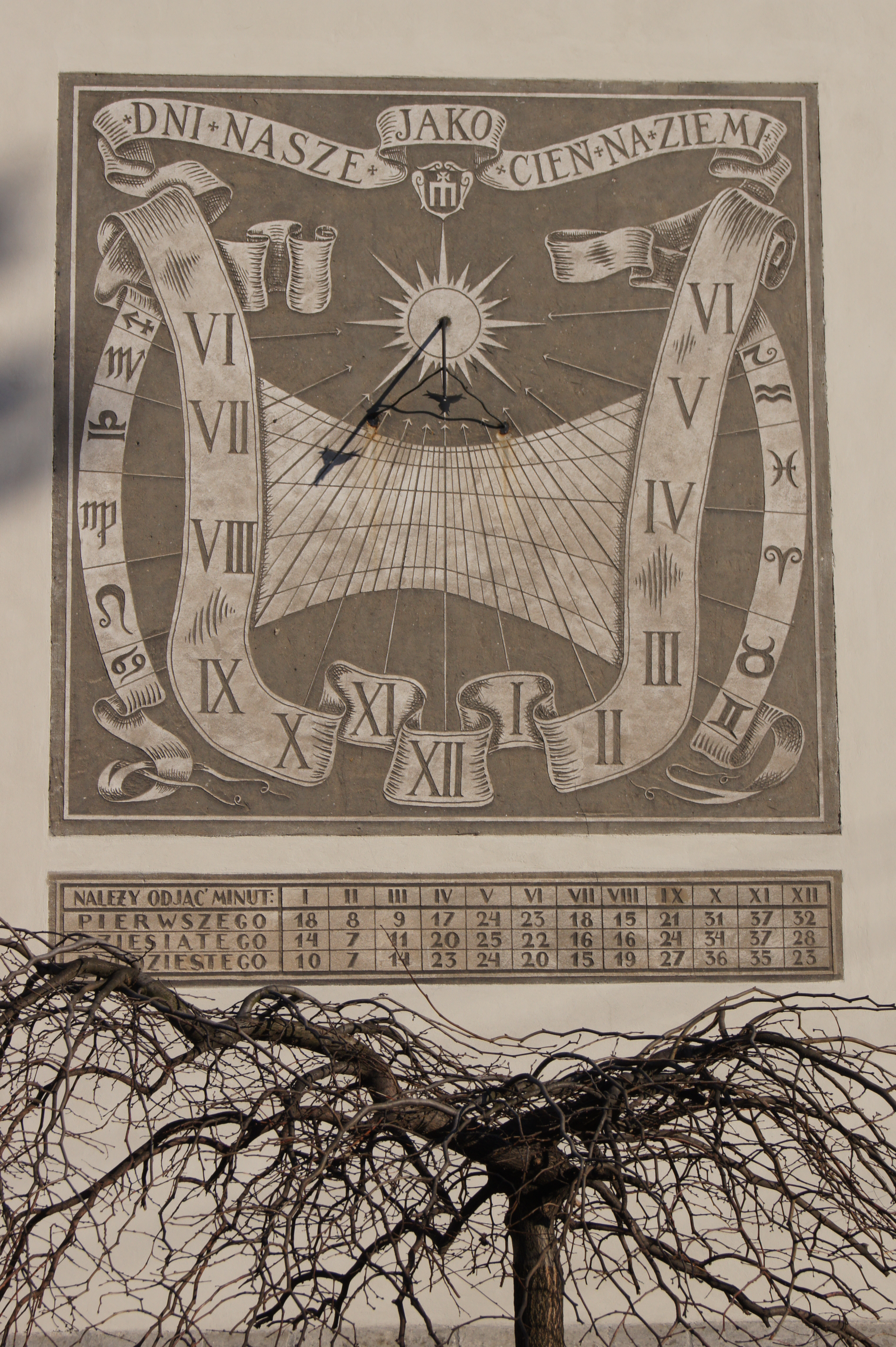 Jędrzejów - kościół Św. Trójcy, zegar słoneczny wykonany przez Feliksa Przypkowskiego.